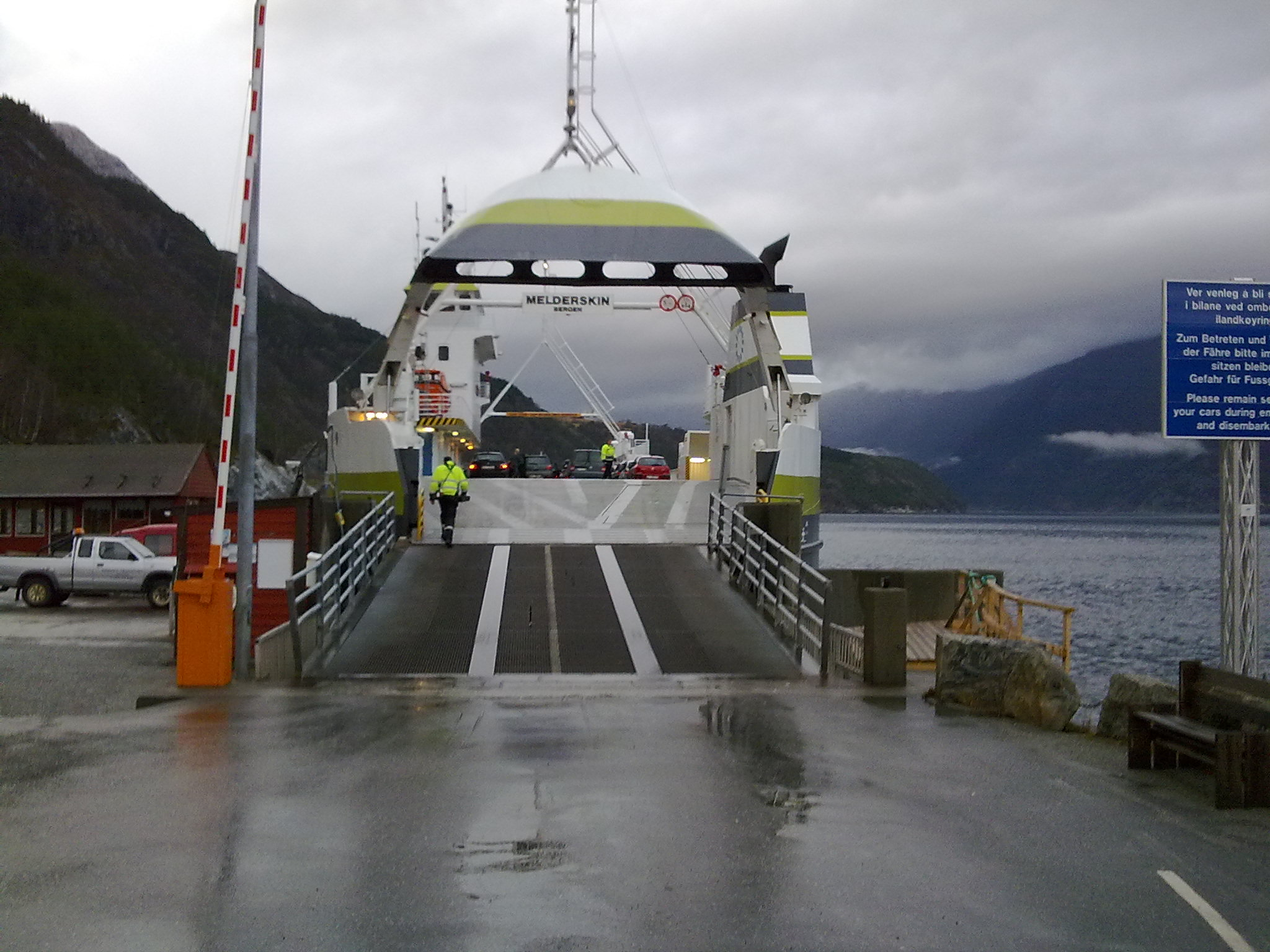 M/F Melderskin ved Brimnes ferjekai November 2009